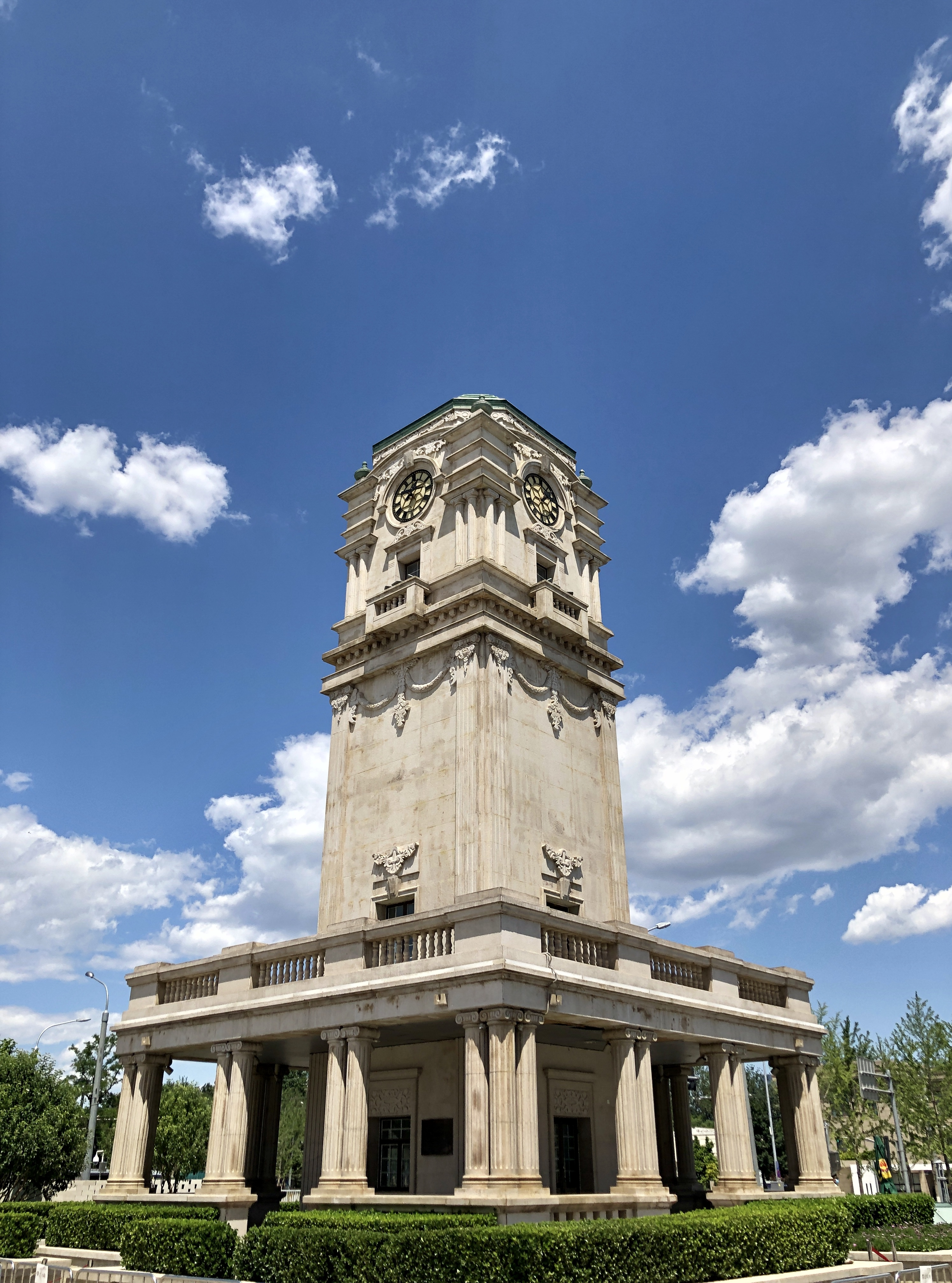 中文（中国大陆）: 2020年北京四面钟，位于京南天桥